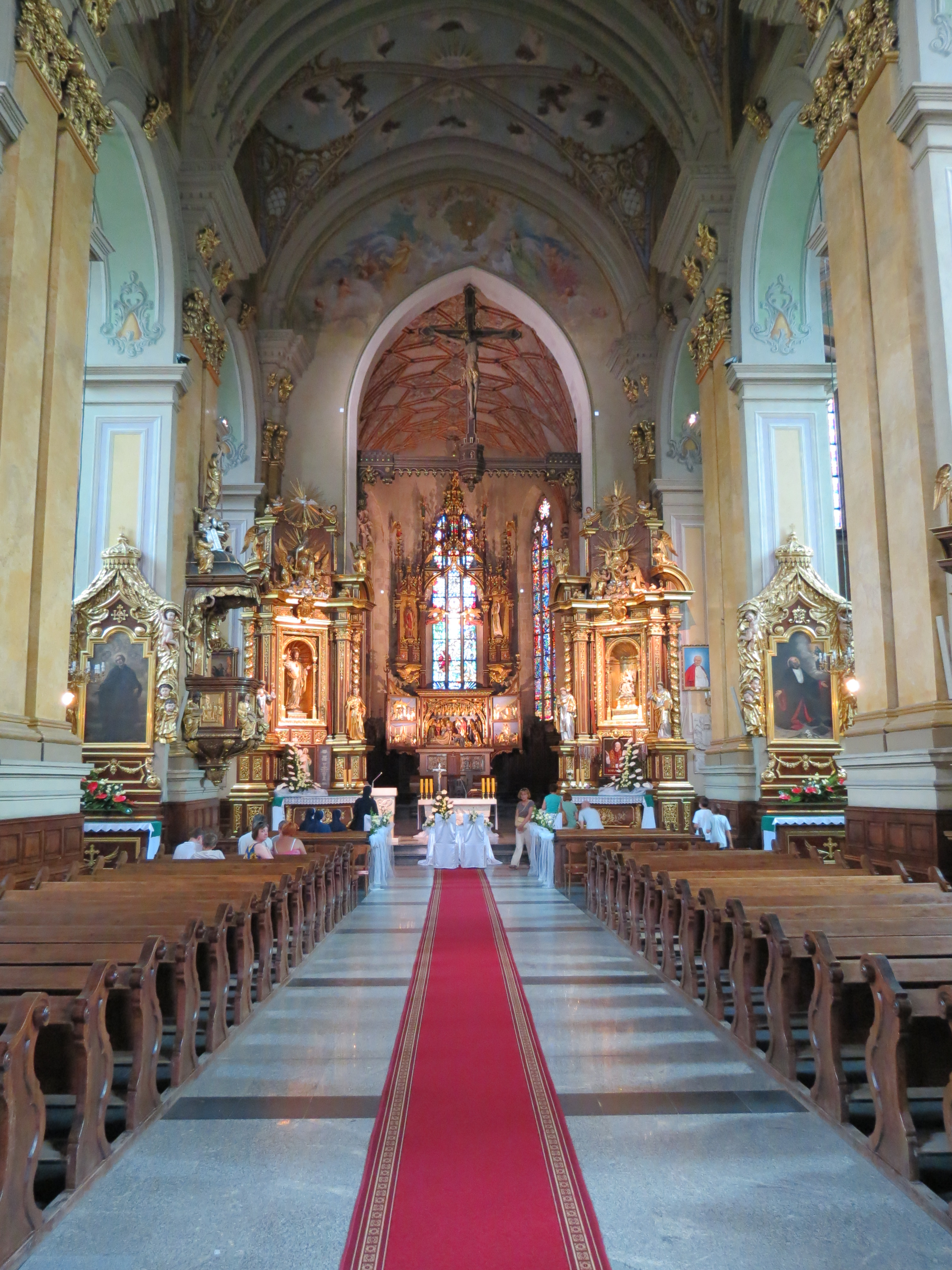 Przemyśl, kościół katedralny p.w. św. Jana Chrzciciela, 1460-1549, XVIII, 1883-1901